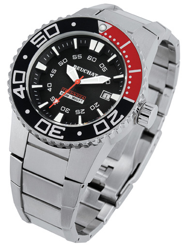 Modèle ACCESS 550 de Beuchat. Beuchat élargit la gamme de ses créations en proposant une montre étanche à 550 mètres. Hommage aux défis sous-marin, l’ACCESS 550, au design contemporain, assure une visibilité optimale grâce à sa lunette tournante sécurisée et son cadran sur niveaux. Caractéristiques : Boîtier acier et verre minéral Etanchéité : 550 mètres Couronne et fond vissés Mouvement quartz date (2S60) 3 aiguilles/date Aiguilles et index luminescents Lunette bi-directionnelle sur ressort (déblocage de la sécurité par pression) Bracelet acier sur boucle déployante avec extension Pile au lithium : 10 ans d’autonomie